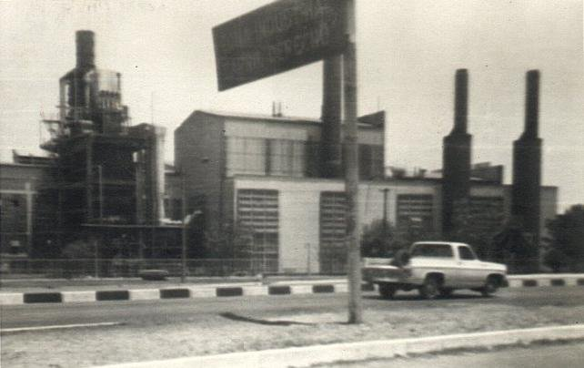 planta de luz gomez